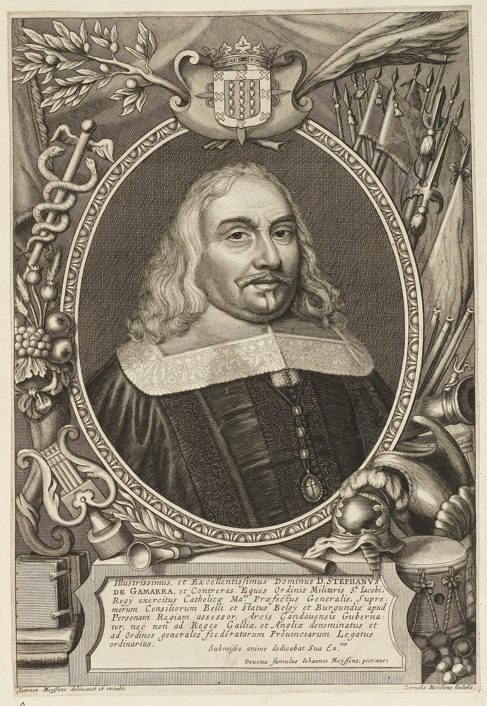 Grafik aus dem Klebeband Nr. 1 der Fürstlich Waldeckschen Hofbibliothek Arolsen Motiv: "D. Stephanus de Gamarra" (Esteban de Gamarra y Contreras)